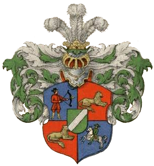 Novosiltsovi suguvõsa aadlivapp (Eestimaa)